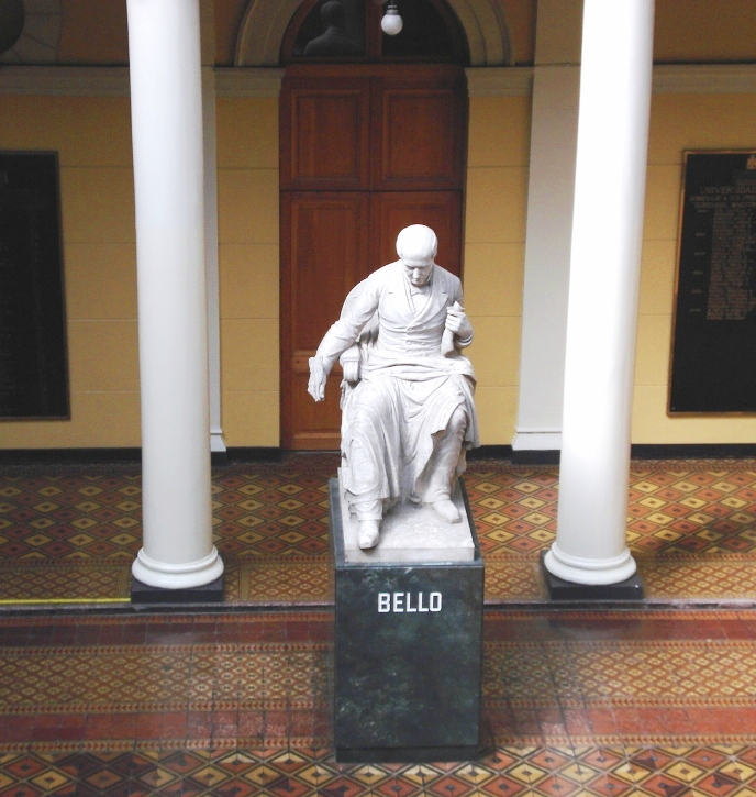 Escultura de Andrés Bello en la Casa Central de la Universidad de Chile, en la ciudad de Santiago.